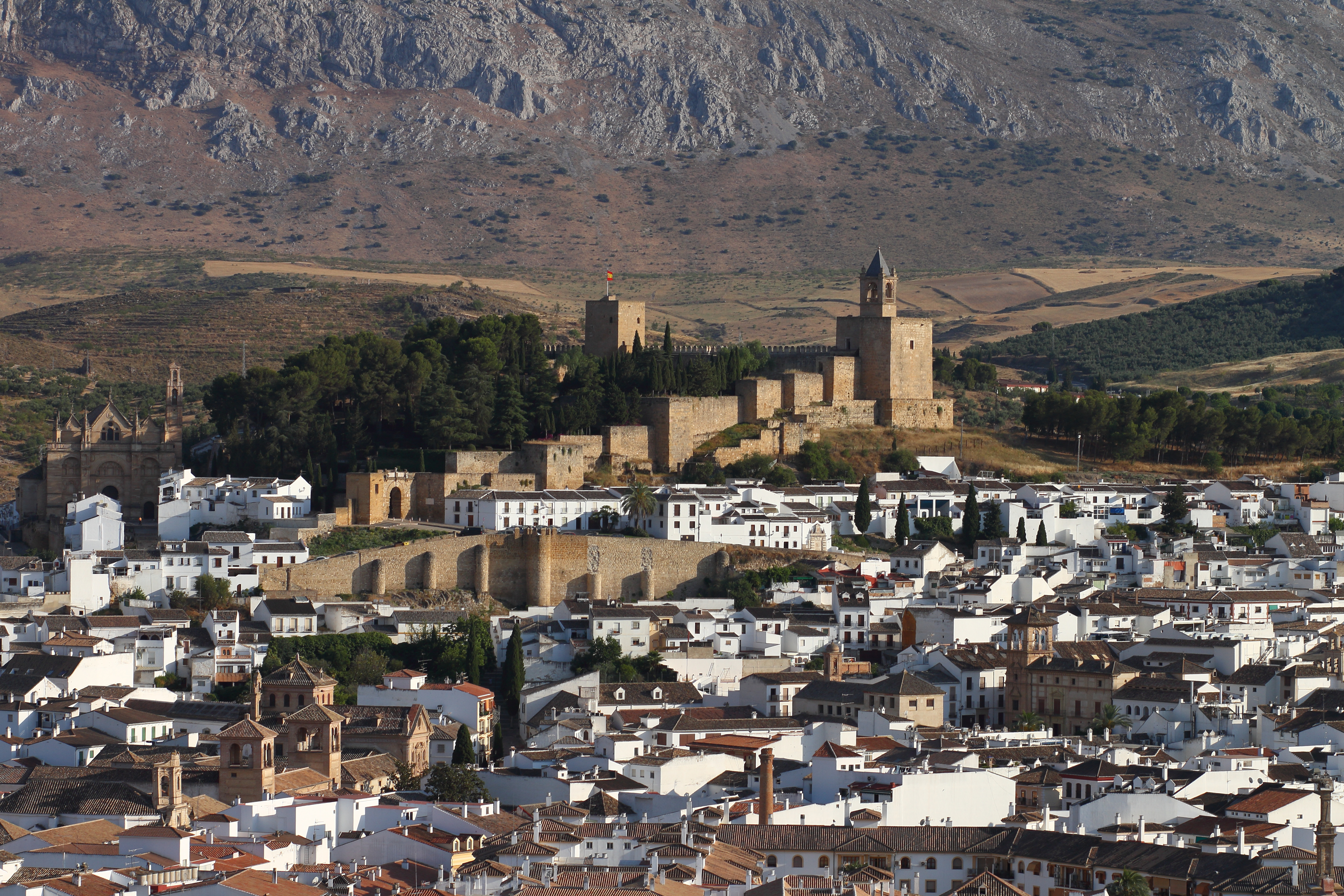 Alcazaba de Antequera, desde el norte de la ciudad